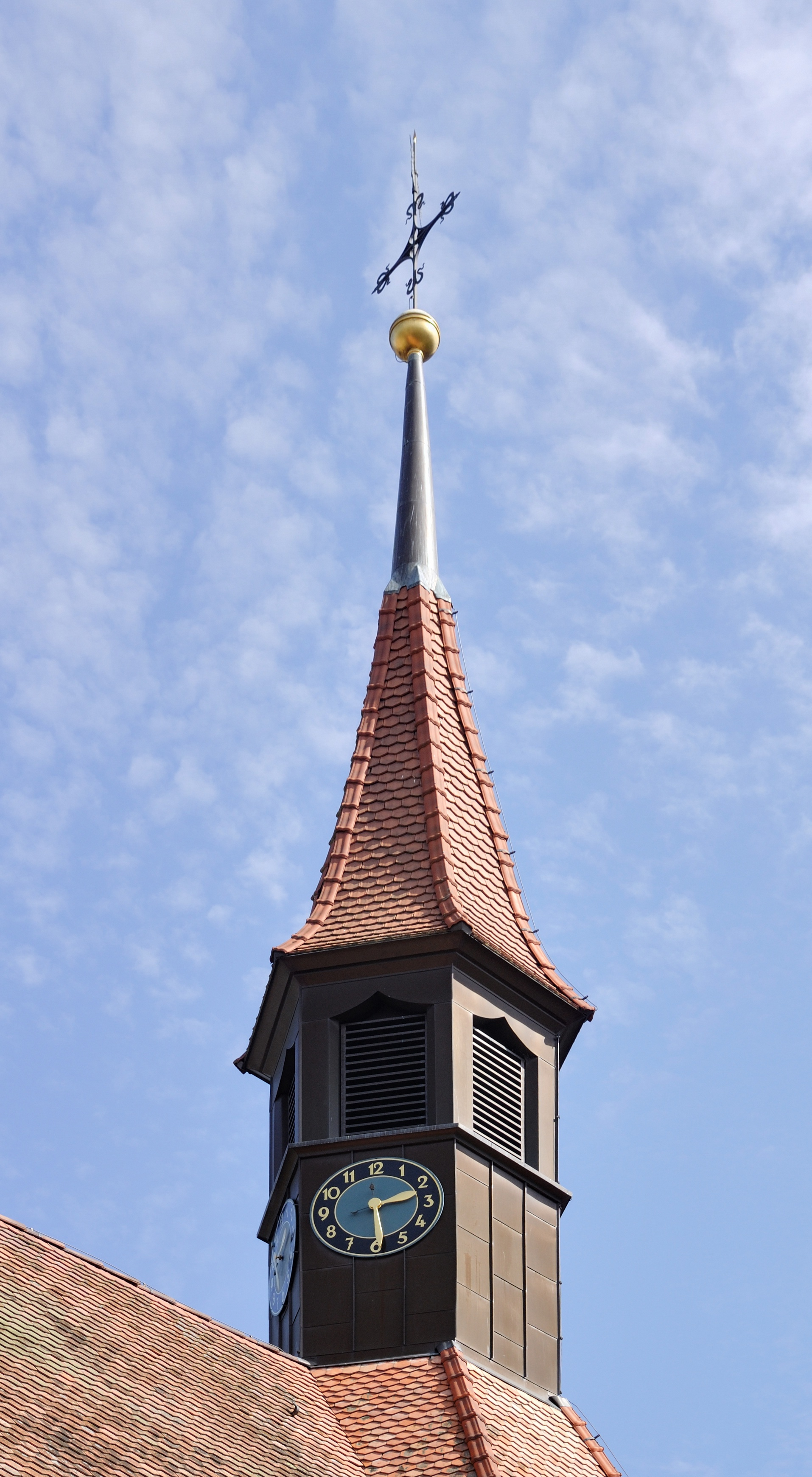 Lörrach: Glockenturm der Josefskirche